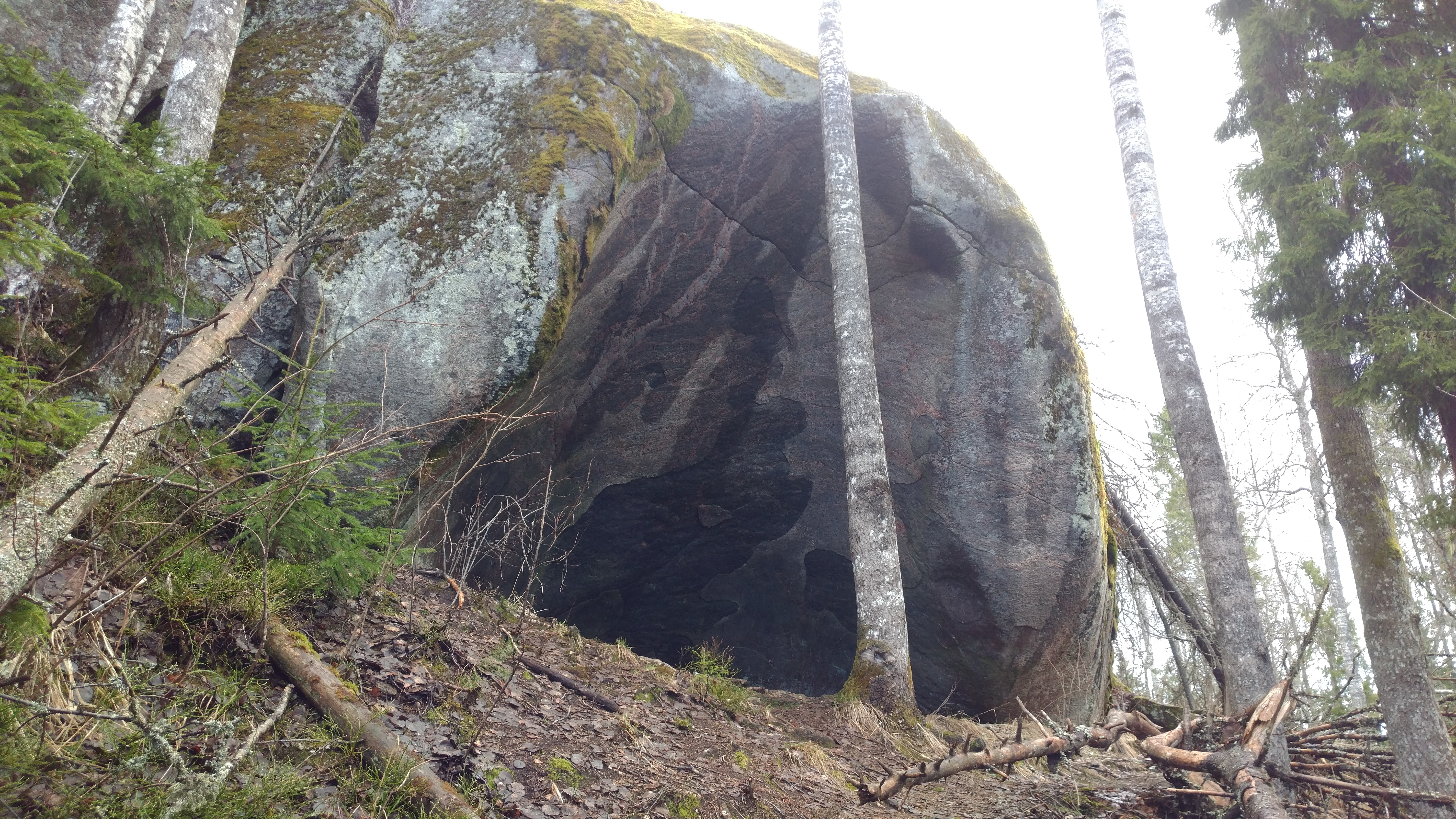 Luolakirnu Konianvuorella Vihdin Moksissa. Valokuva otettu keväällä 2018.